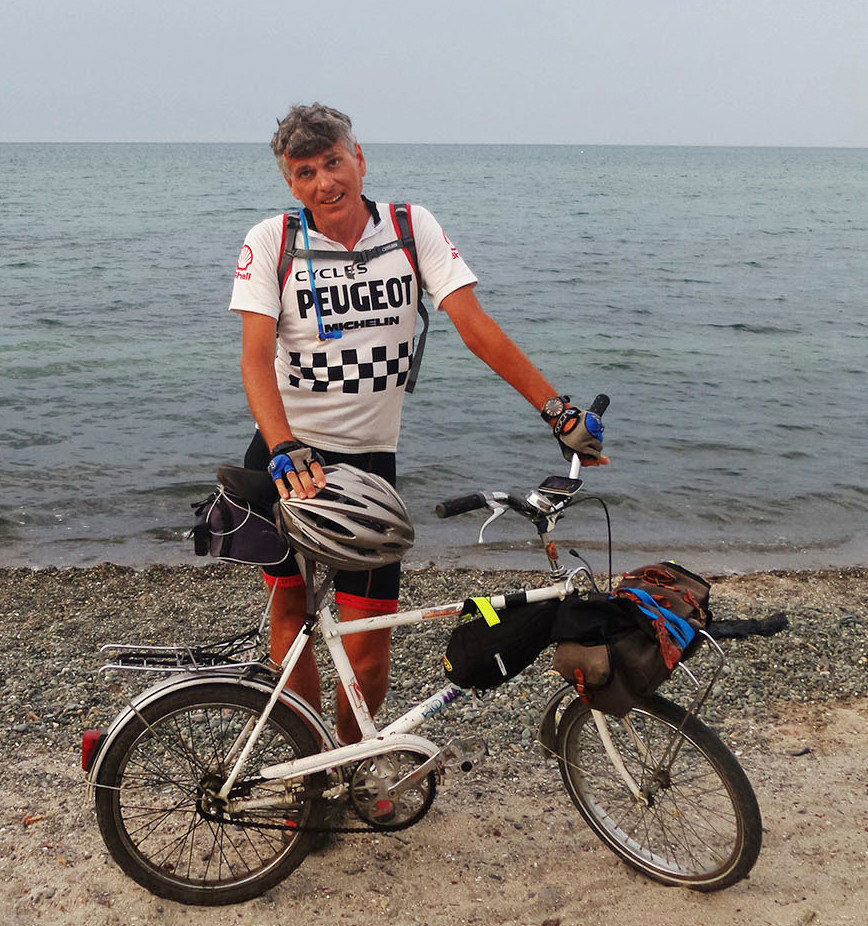 Tim Moore während seiner Radtour auf dem Iron Curtain Trail 2015